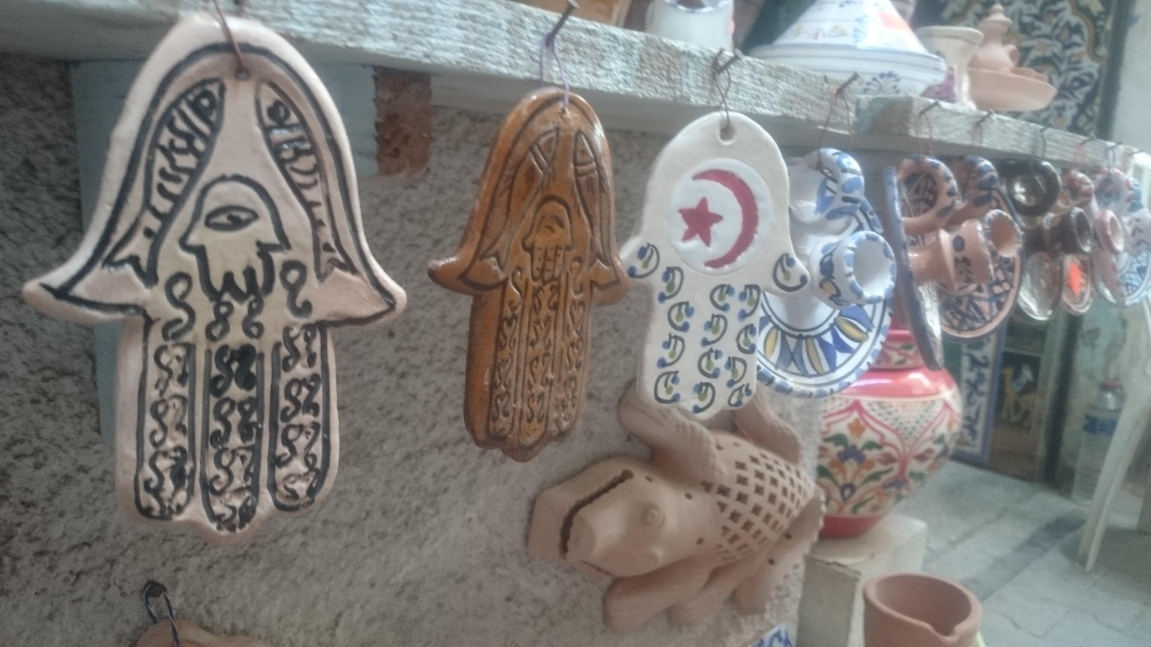 مجوعة من المصنوعات الفخارية على شكل خمسة